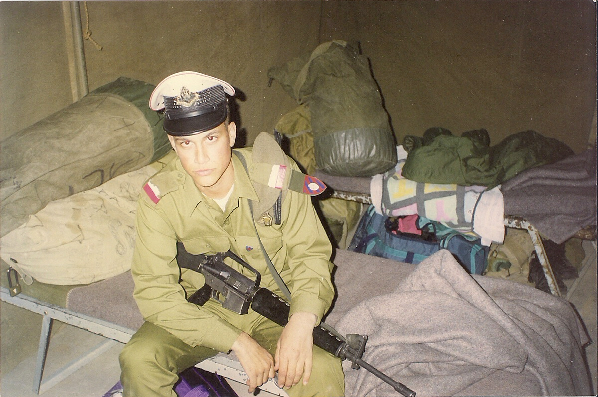 סמ"ר אסי עזר, חייל מצטיין במשטרה צבאית.